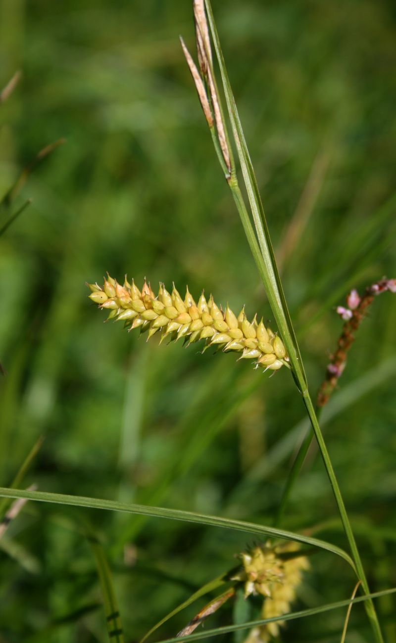 Blasen-Segge (Carex vesicaria), Sauergräser (Cyperaceae) - Österreich/Austria/Autriche: Oberösterreich, Hausruckviertel, Kien NW Attnang-Puchheim